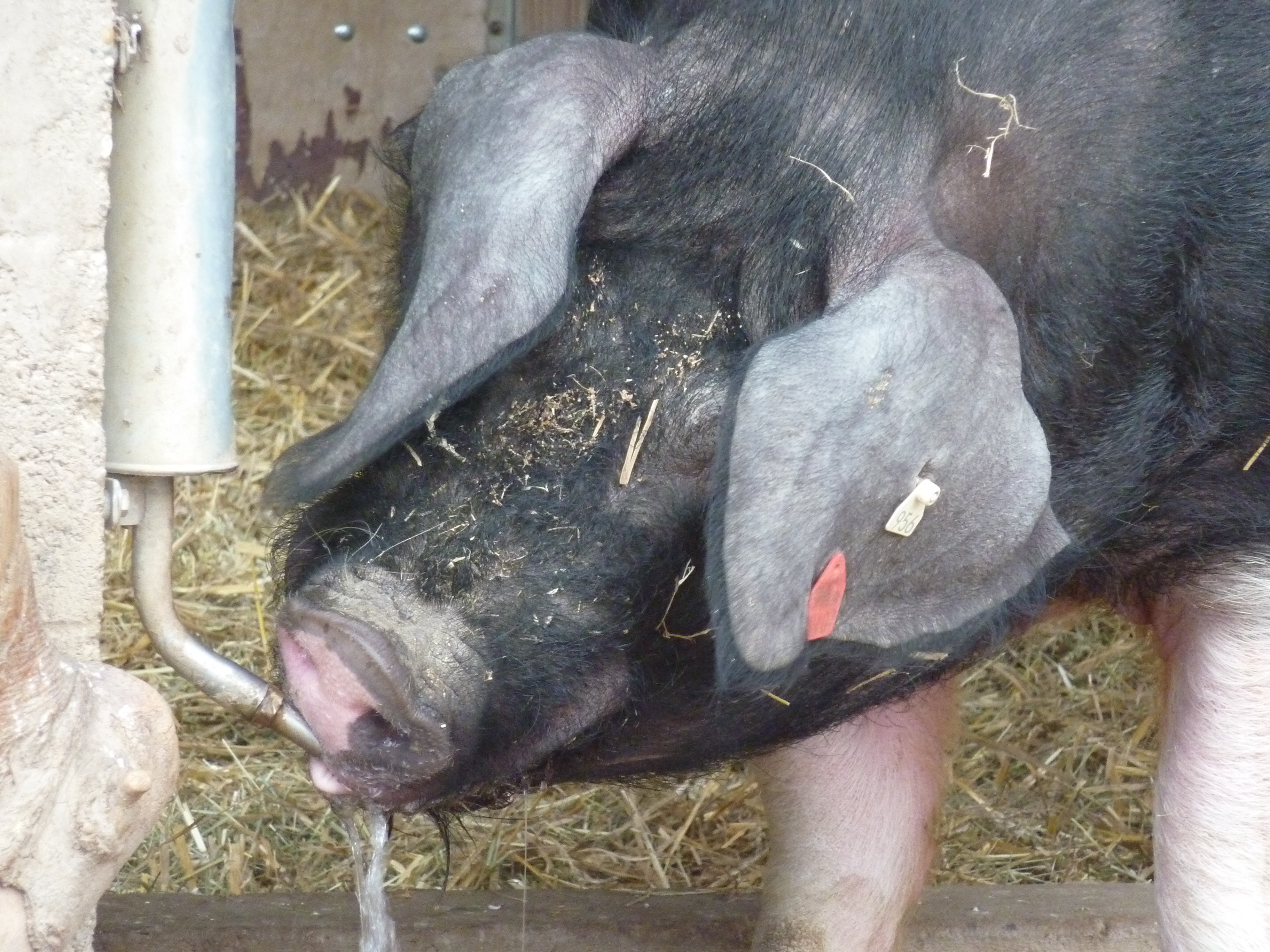 Hällisches Landschwein an der Tränke